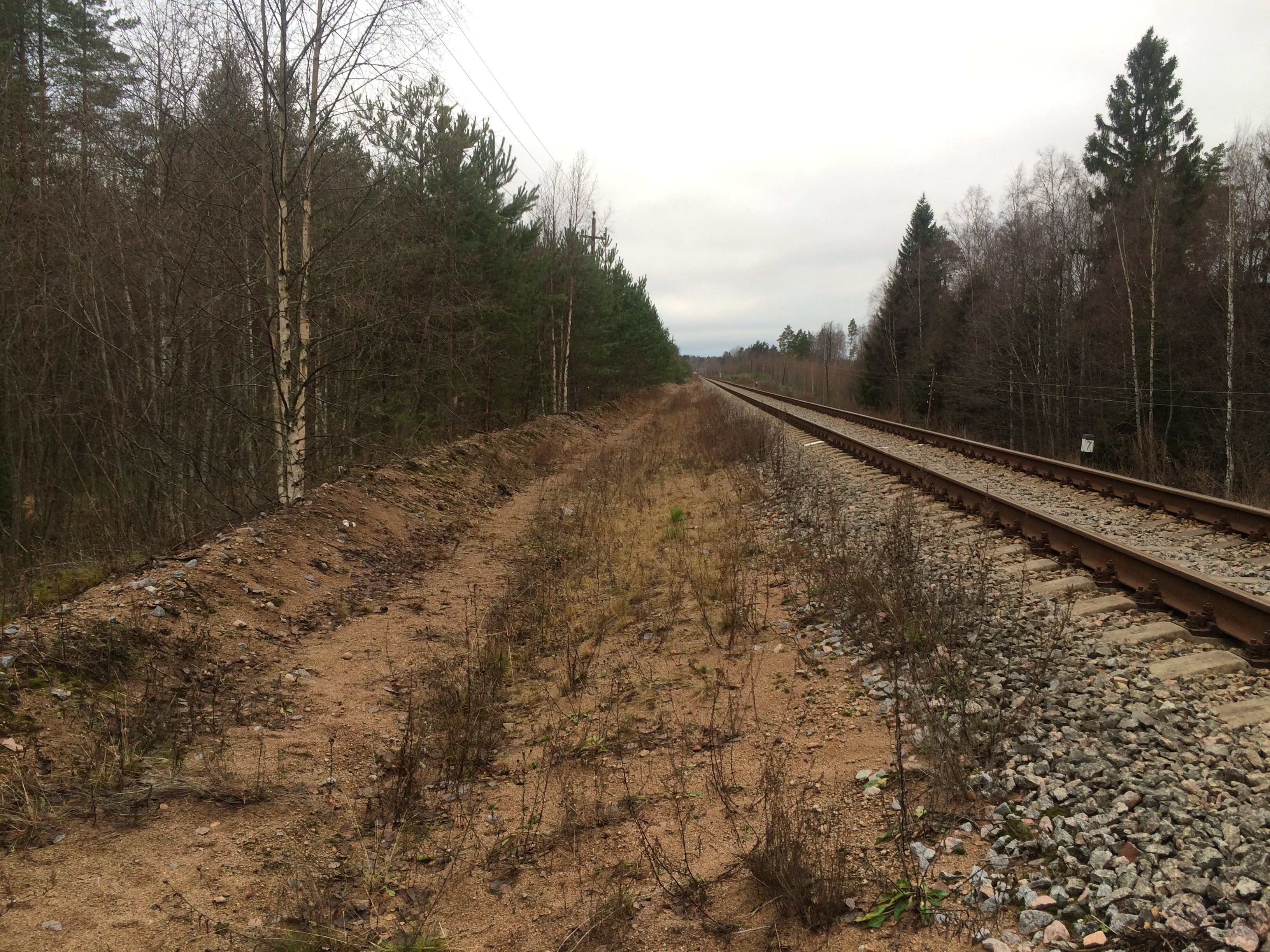 Тайкинамяки пост